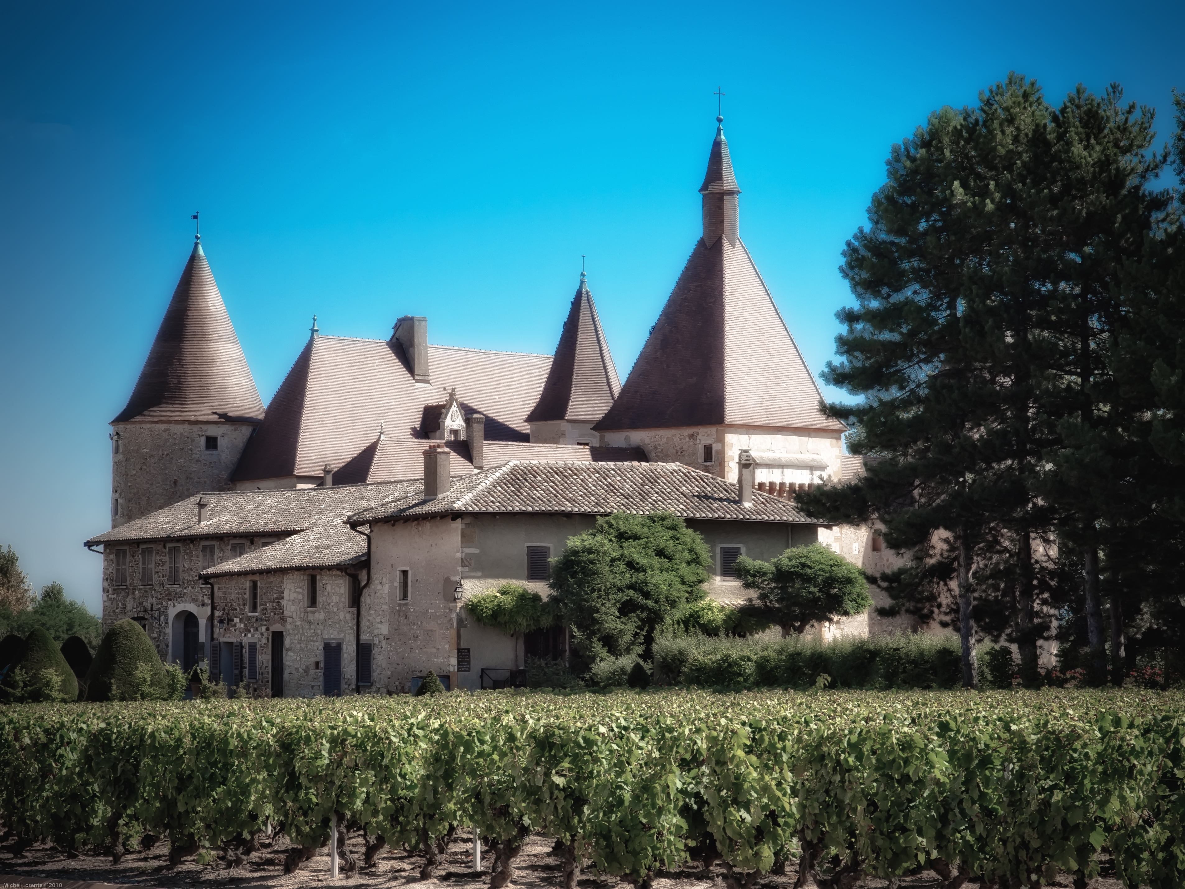 Château de Corcelles-en-Beaujolais .